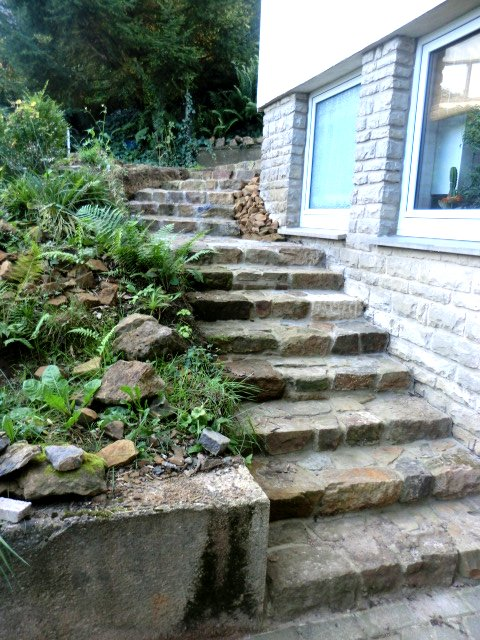 Steintreppe aus Portasandstein